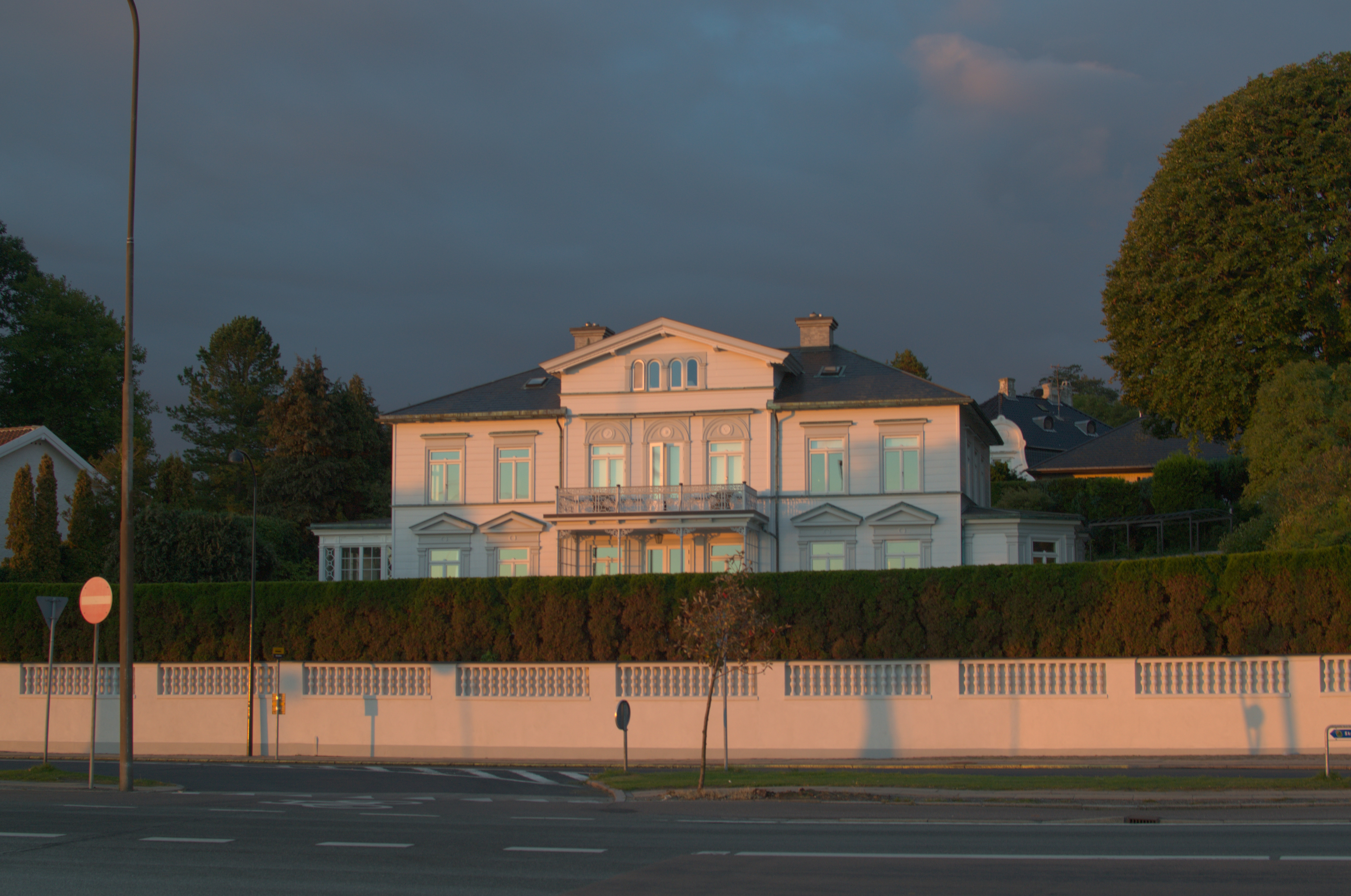 Belvedere on Strandvejen North of Copenhagen, Denmark